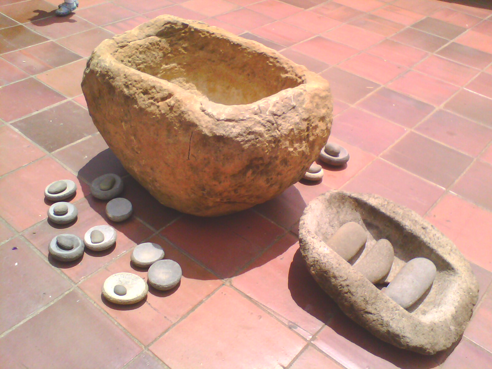 Cultura prehispanica famosa por sus esculturas en piedra